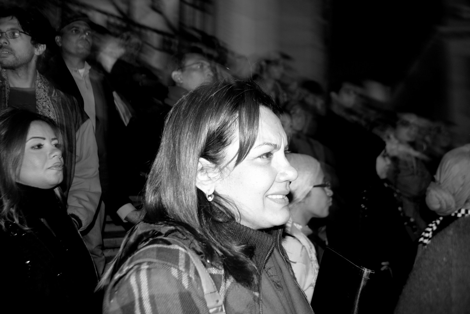 Potential presidential candidate Bothaina Kamel